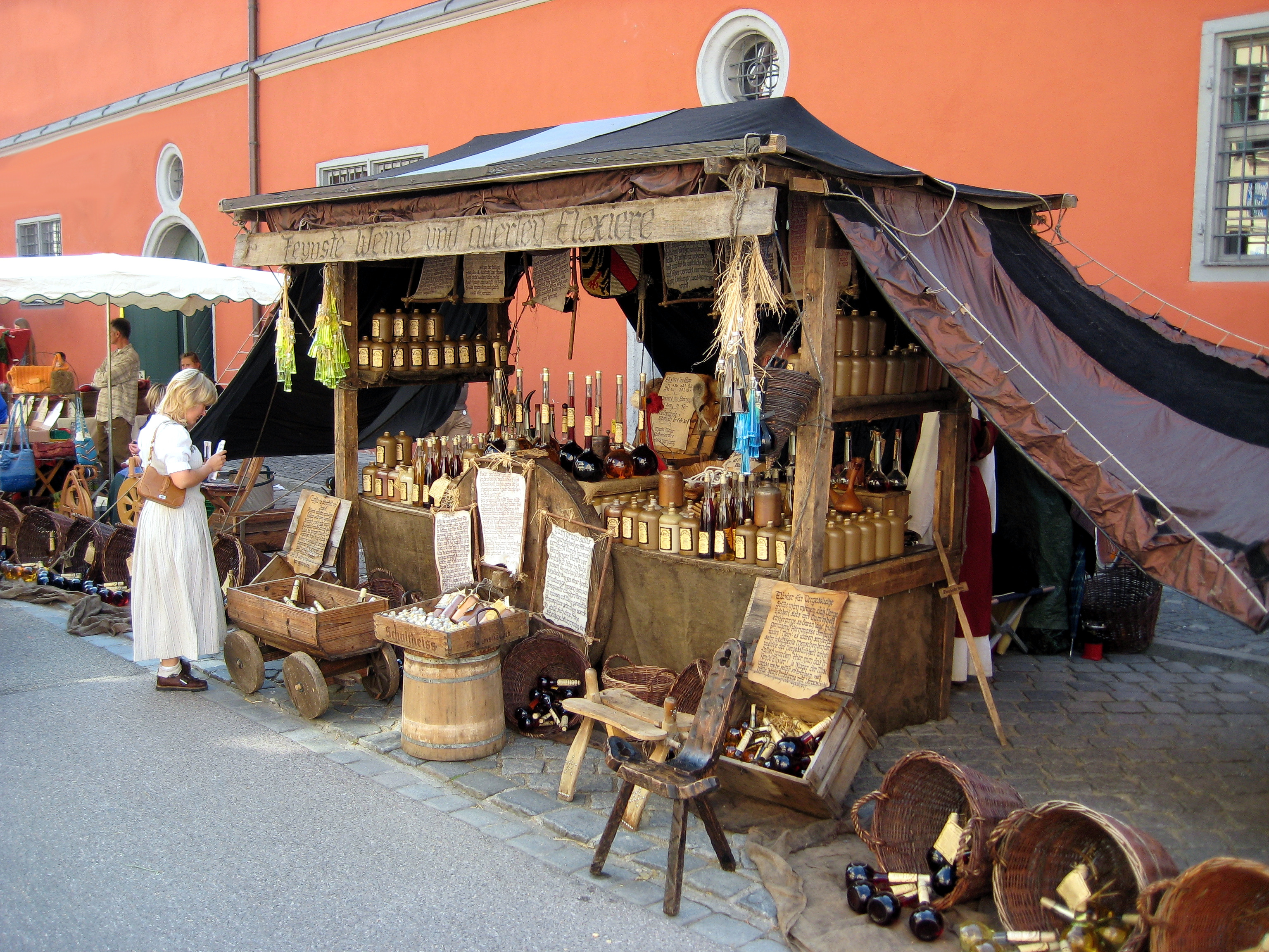 Nördlinger Stadtmauerfest 2007: "Feynste Weine und allerley Elexiere"